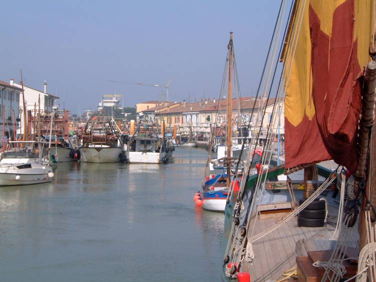 Je suis l'auteur de cette photo prise en avril 2007